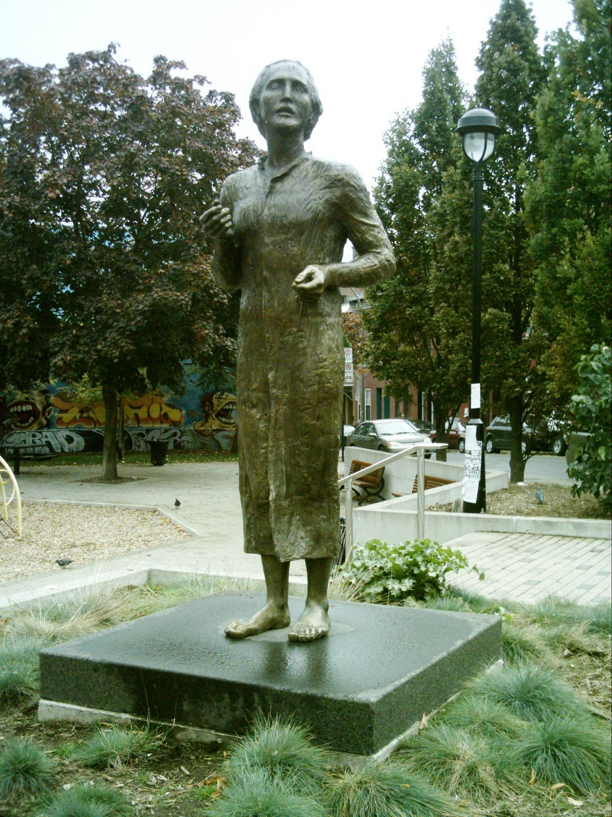 « Éternellement jeune, enveloppé dans ma cape ». Don du Ministère de la Culture et des Cultes de Roumanie à la Ville de Montréal. Oeuvre de Vasile Gorduz. Inaugurée le 18 septembre 2004. Mihai Eminescu, 1850-1889. Poète national roumain. Place de la Roumanie. Le Plateau-Mont-Royal, Montréal.